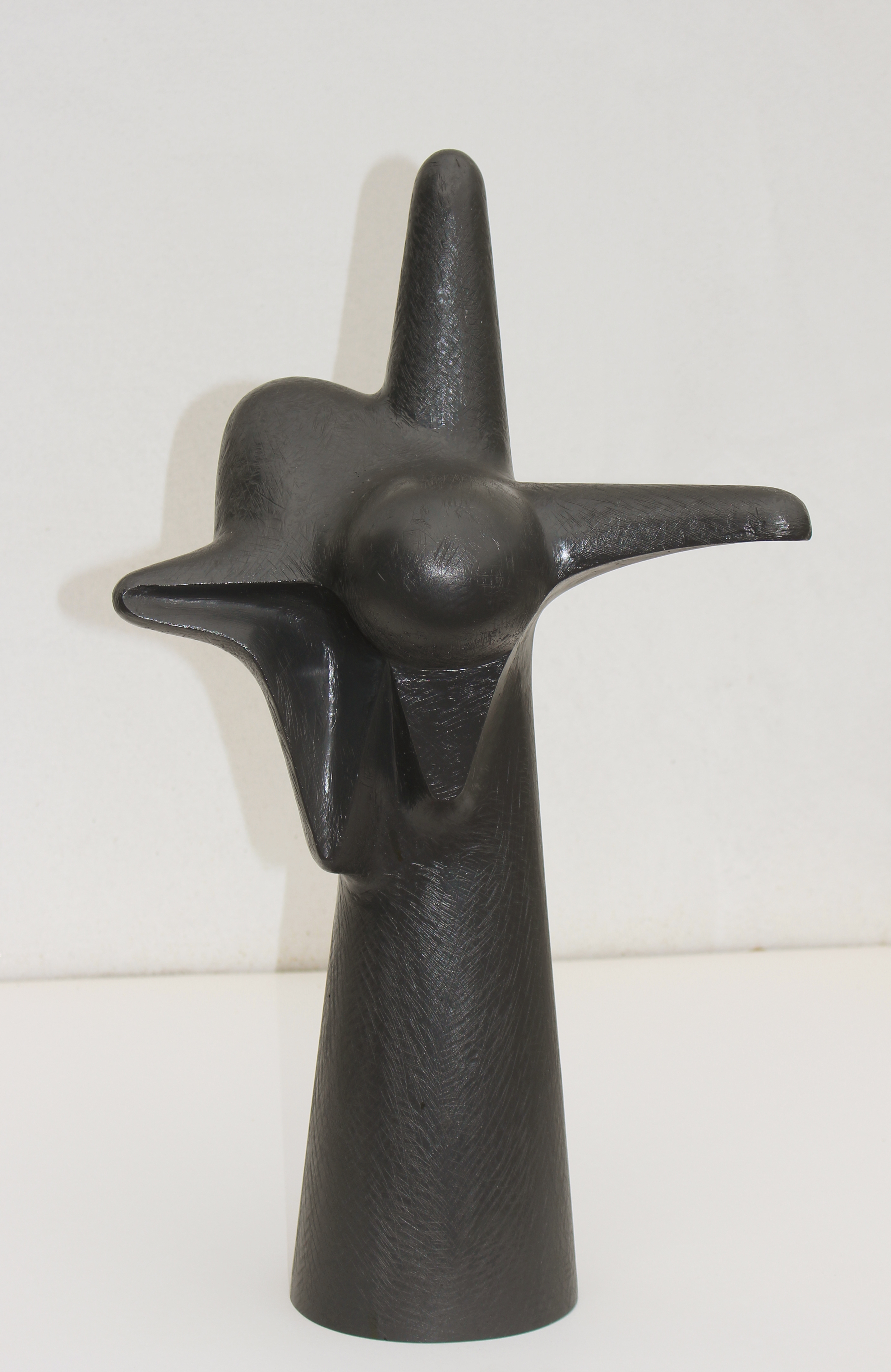 abstrakte Polyester-Plastik leidender Christus